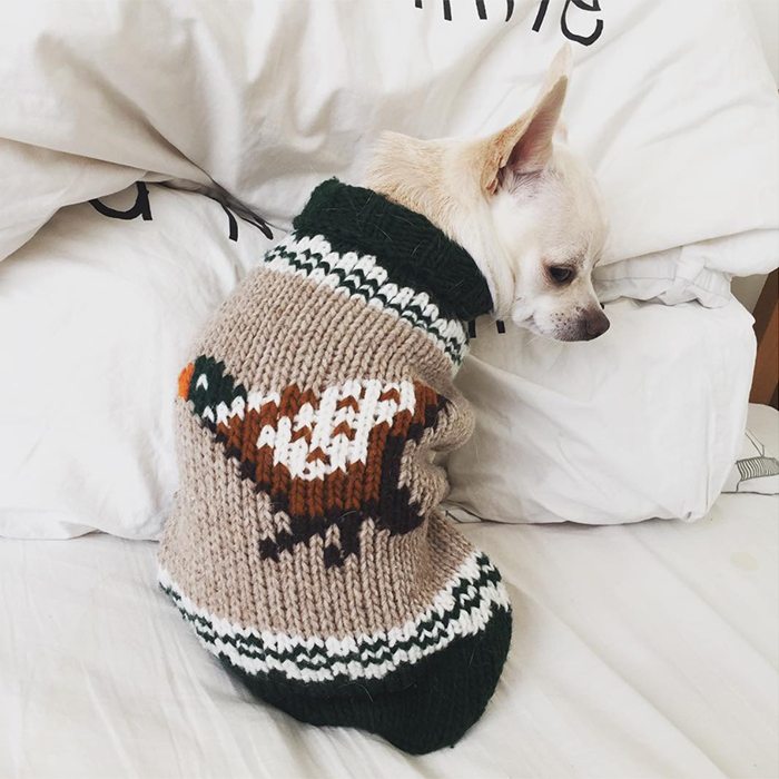 В холодное время года важно следить за тем, чтобы собака не переохлаждалась